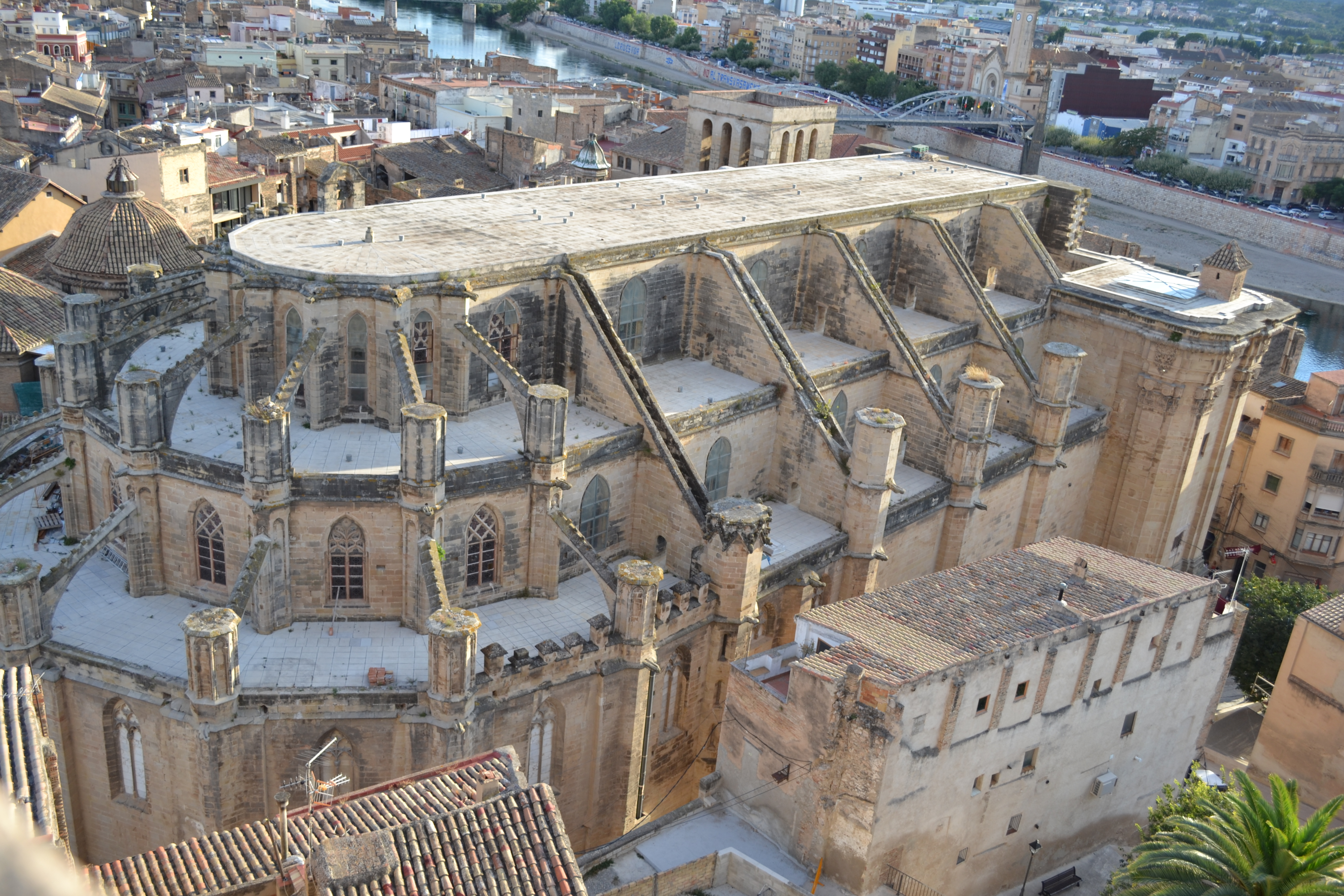 Catedral de Tortosa des del Parador de Turisme.